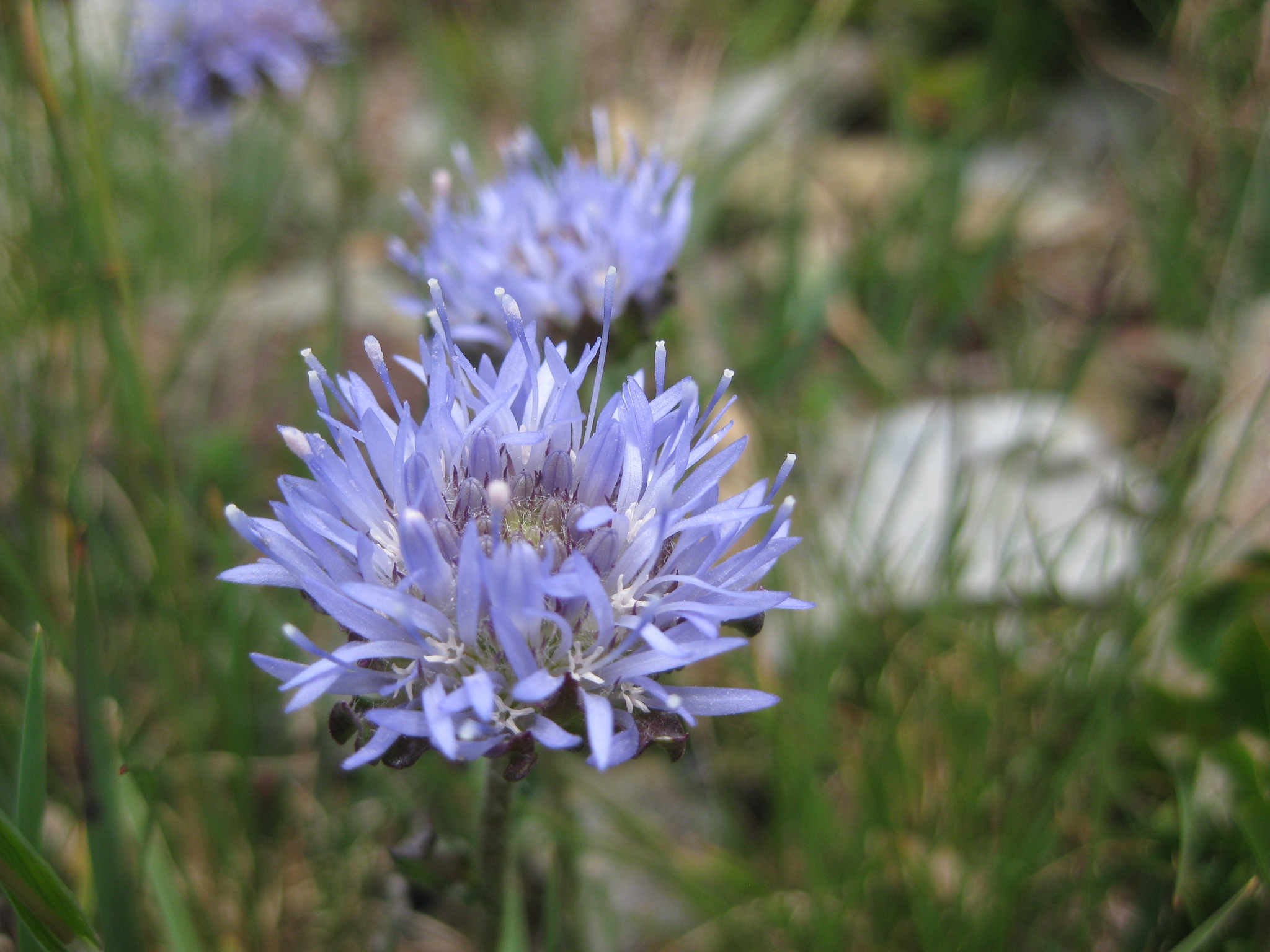 Jasione crispa inflorescence